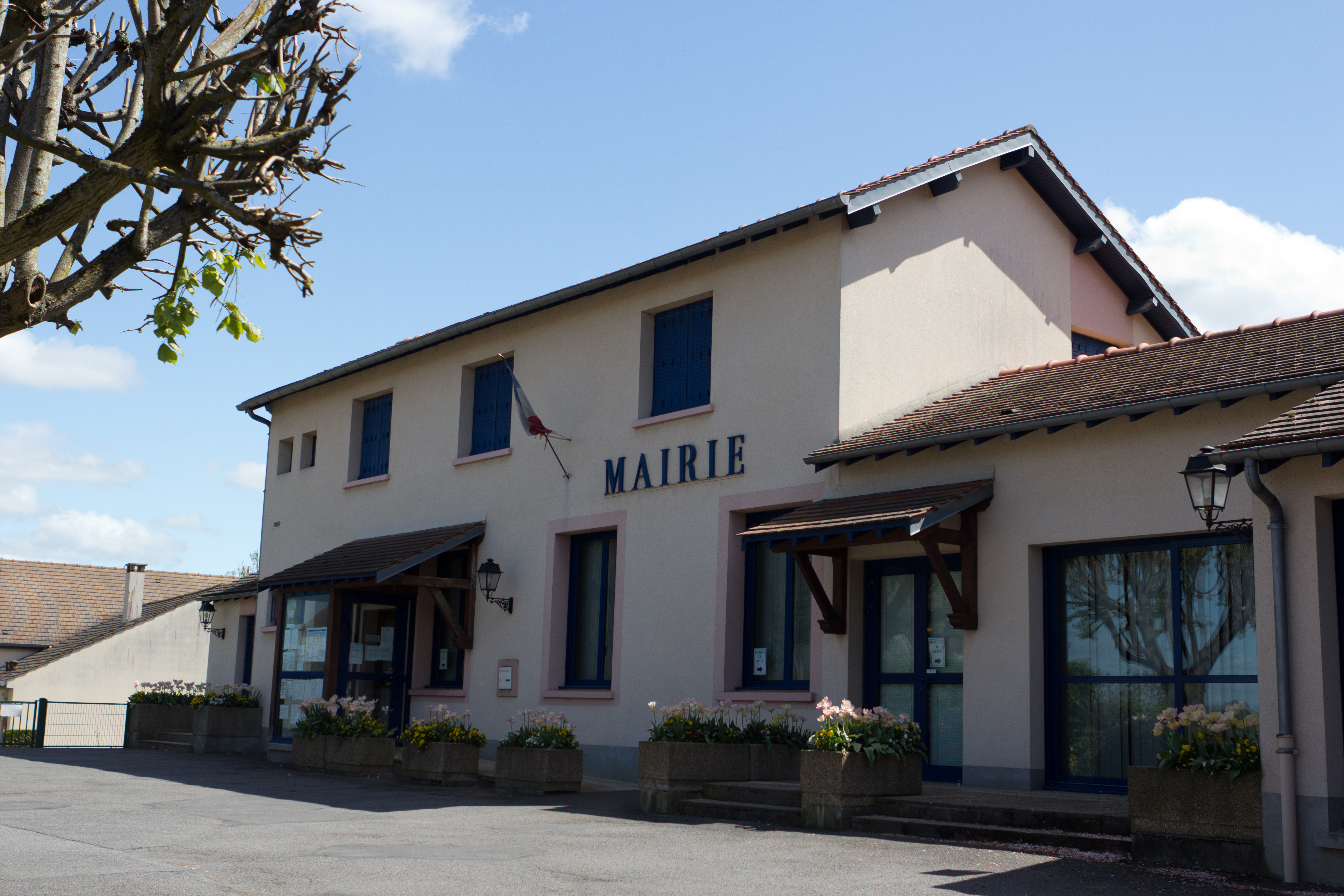 Mairie de Baulne, Baulne, département de l'Essonne, France